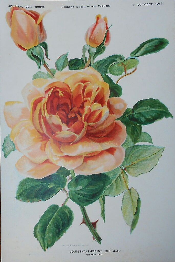 Rose 'Louise-Catherine Breslau', illustration in Journal des roses, octobre 1912.